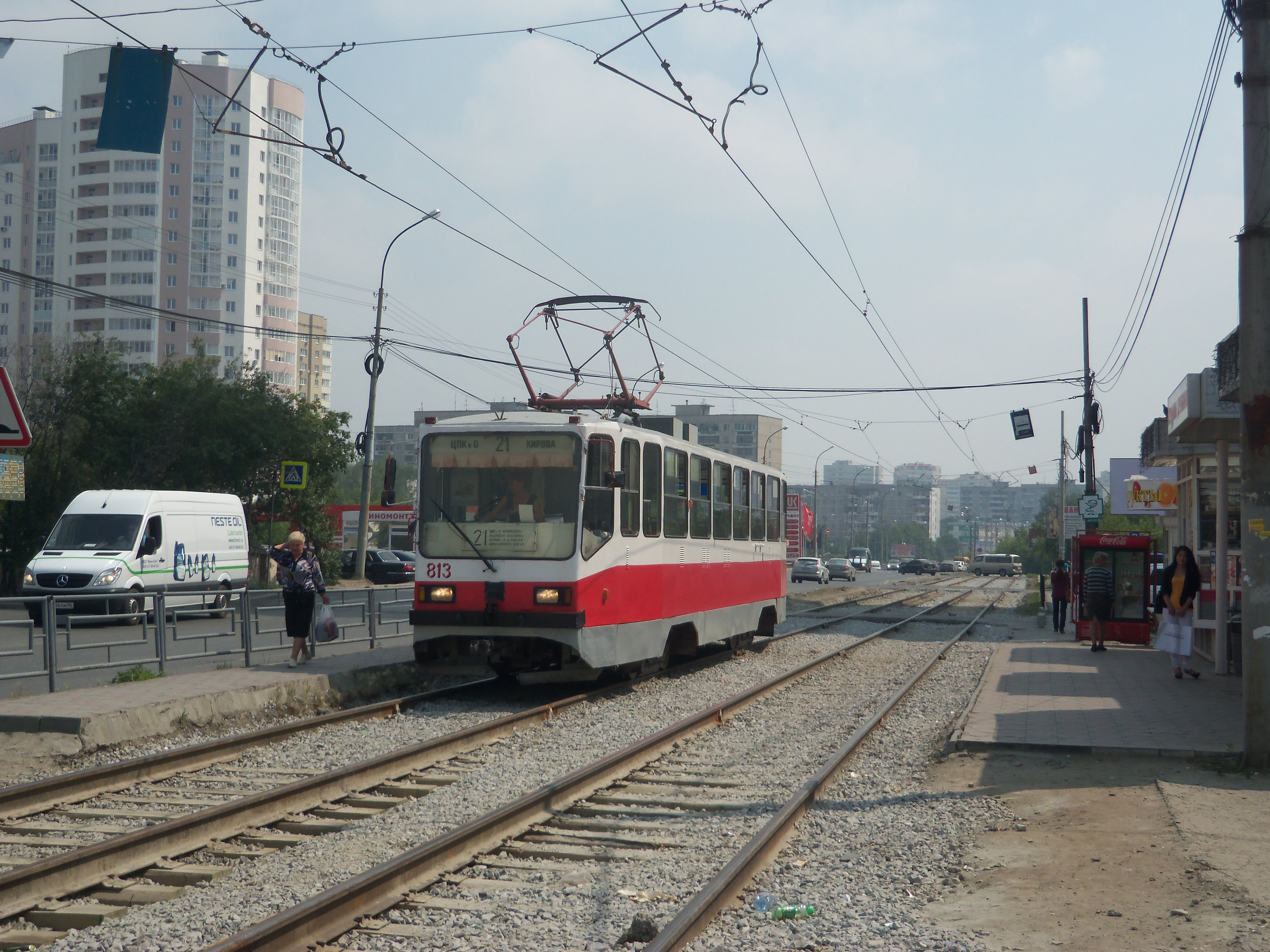 (21 маршрут)